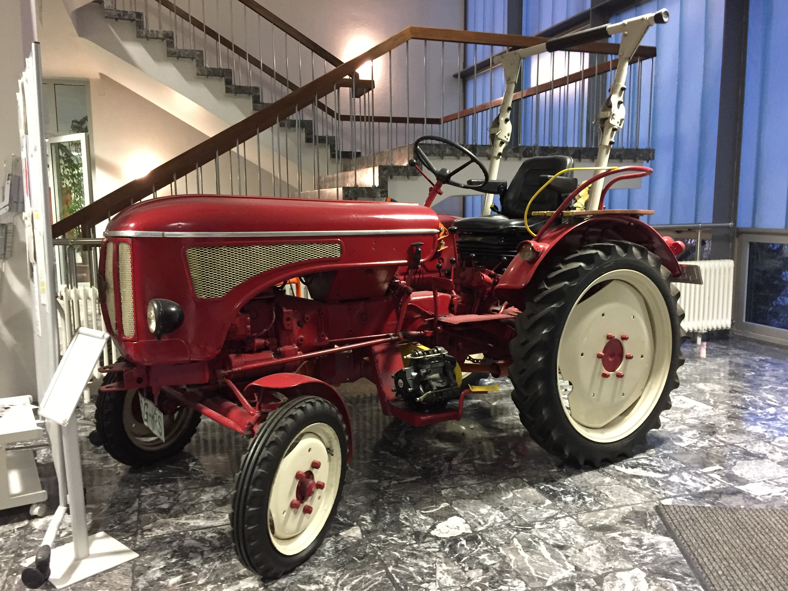 Traktor Hanomag "Greif"